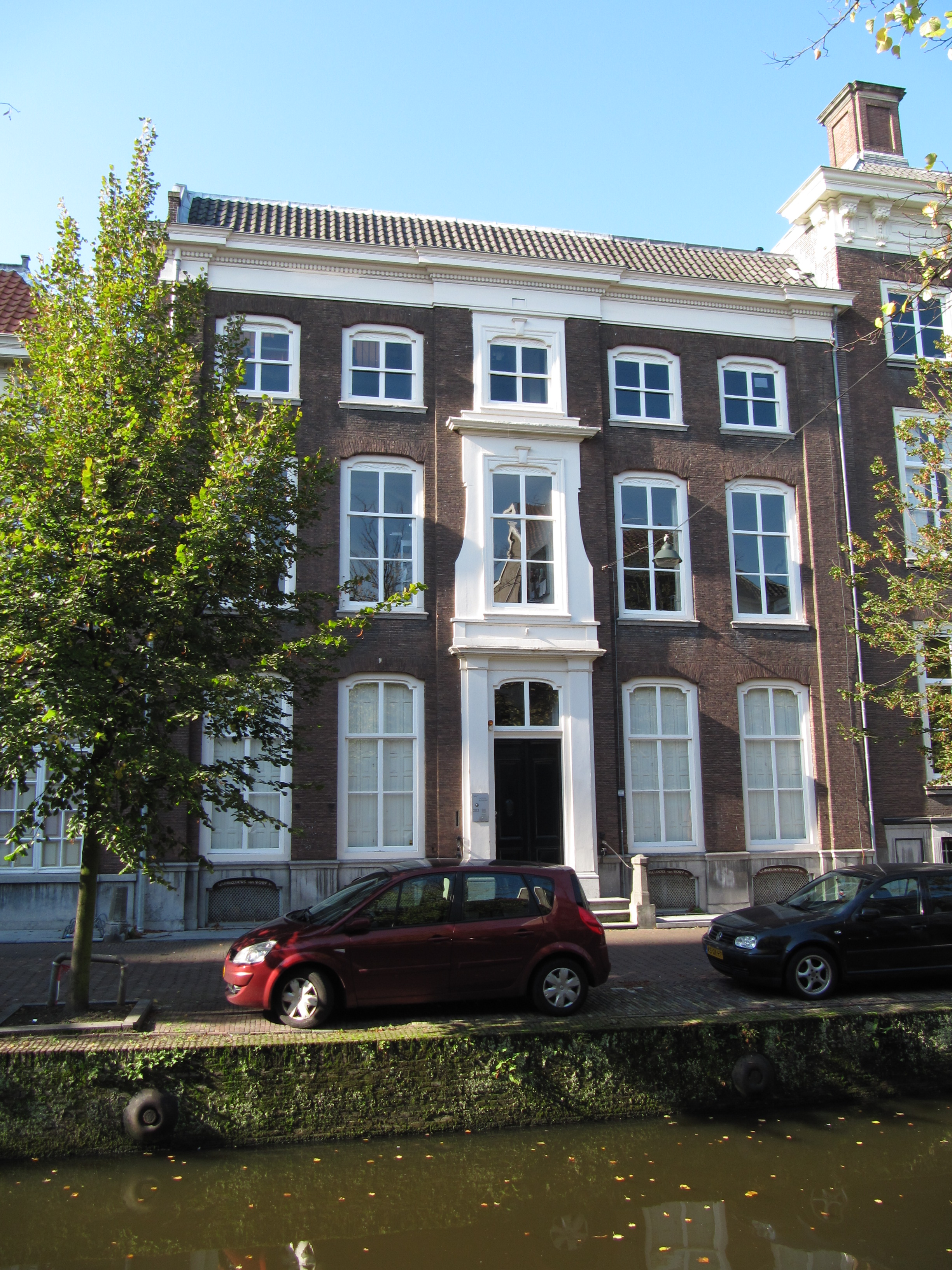 RM12036 Delft - Oude Delft 203.jpg